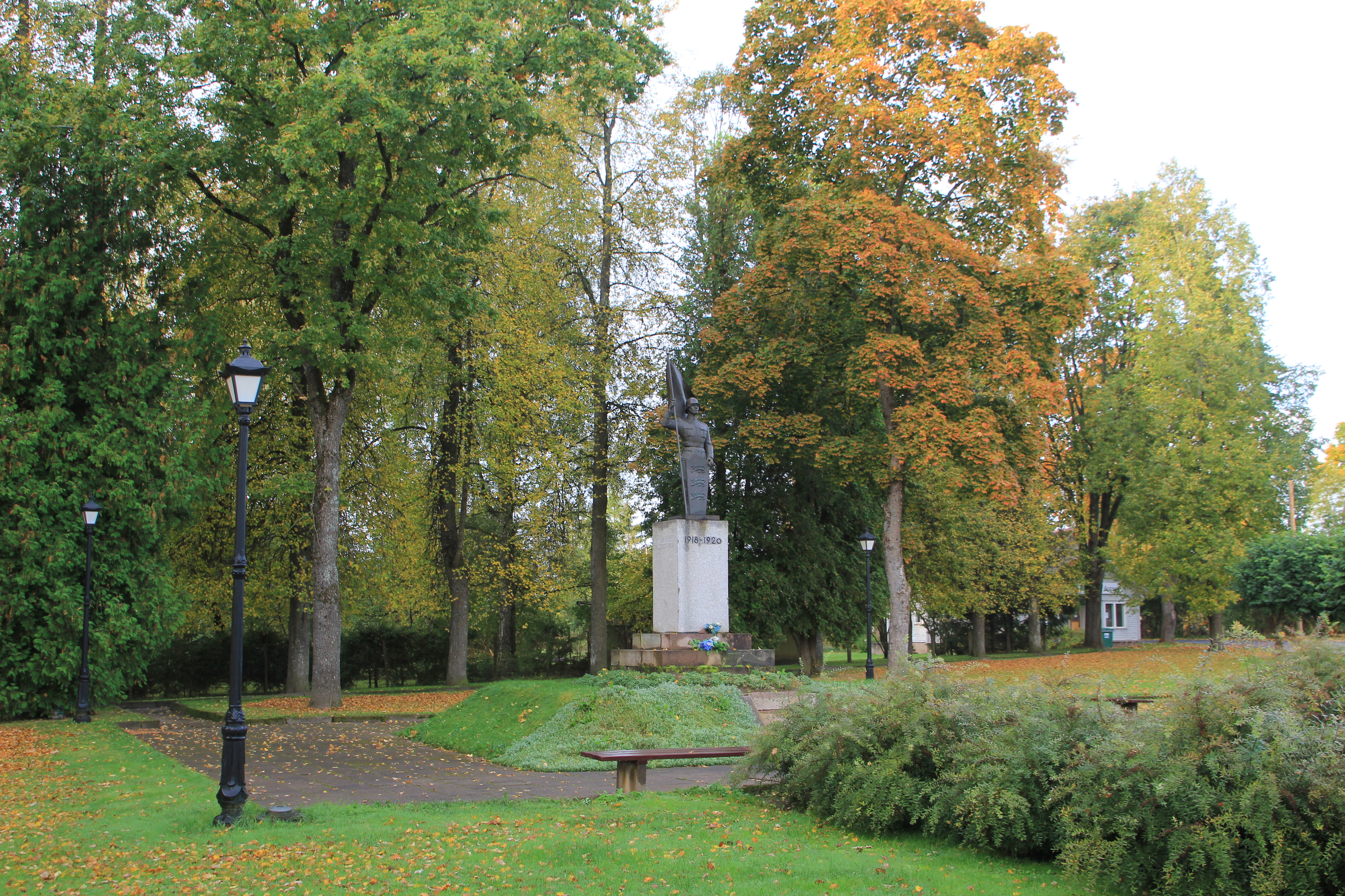 1918-1920 Tarvastu vabadussõja mälestussammas Mustlas